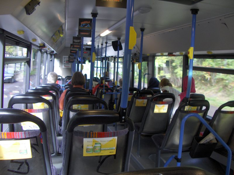 Nobinan Volvo B7RLE / Volvo 204L sisältä kuvattuna.